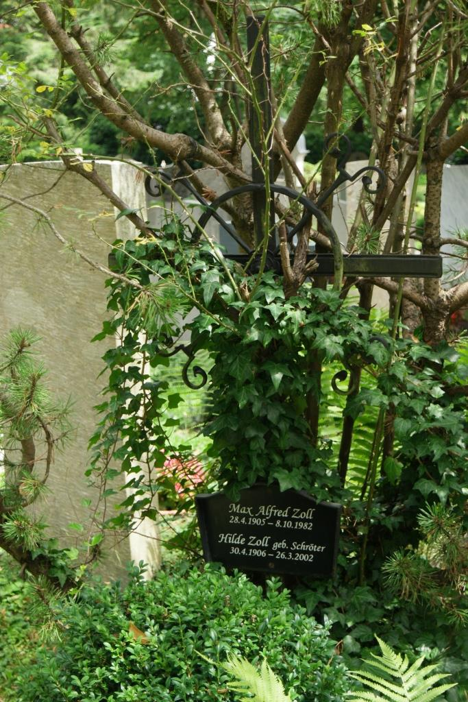 Grab des Tierparkdirektors und Journalisten Max Alfred Zoll (1905-1982) auf dem Alten Friedhof München-Solln, Friedhofweg 1